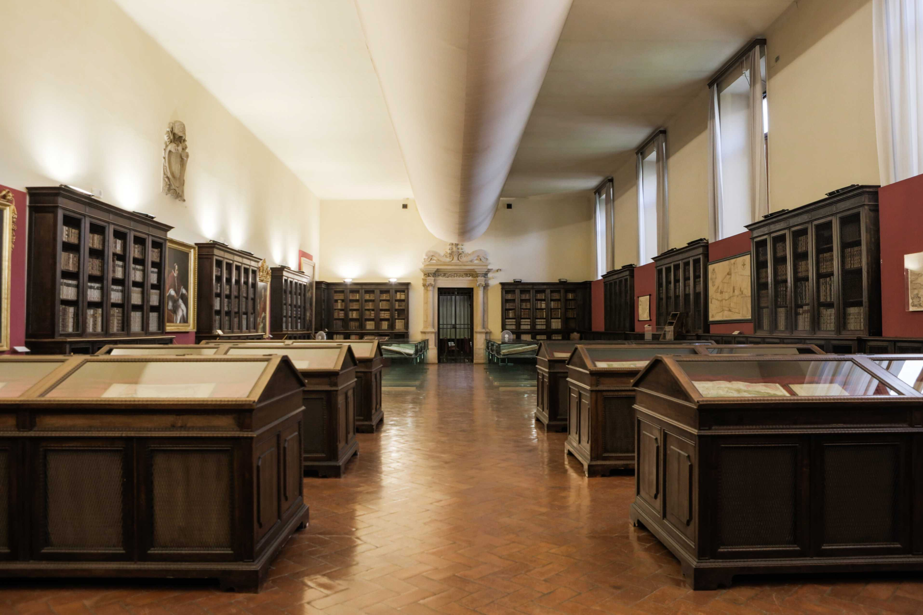 Biblioteca Malatestiana This is a photo of a monument which is part of cultural heritage of Italy.